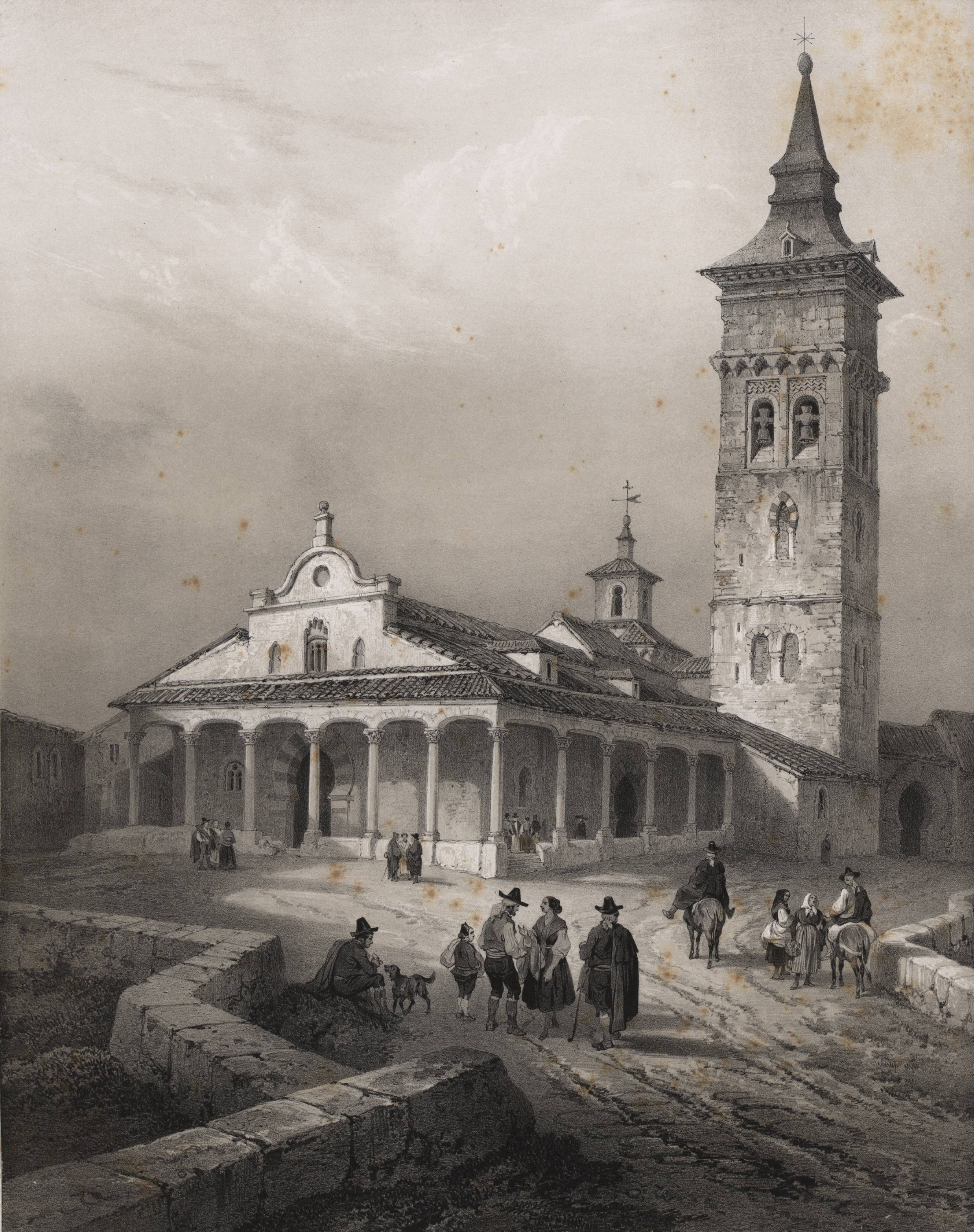 Santa María de Guadalaxara.